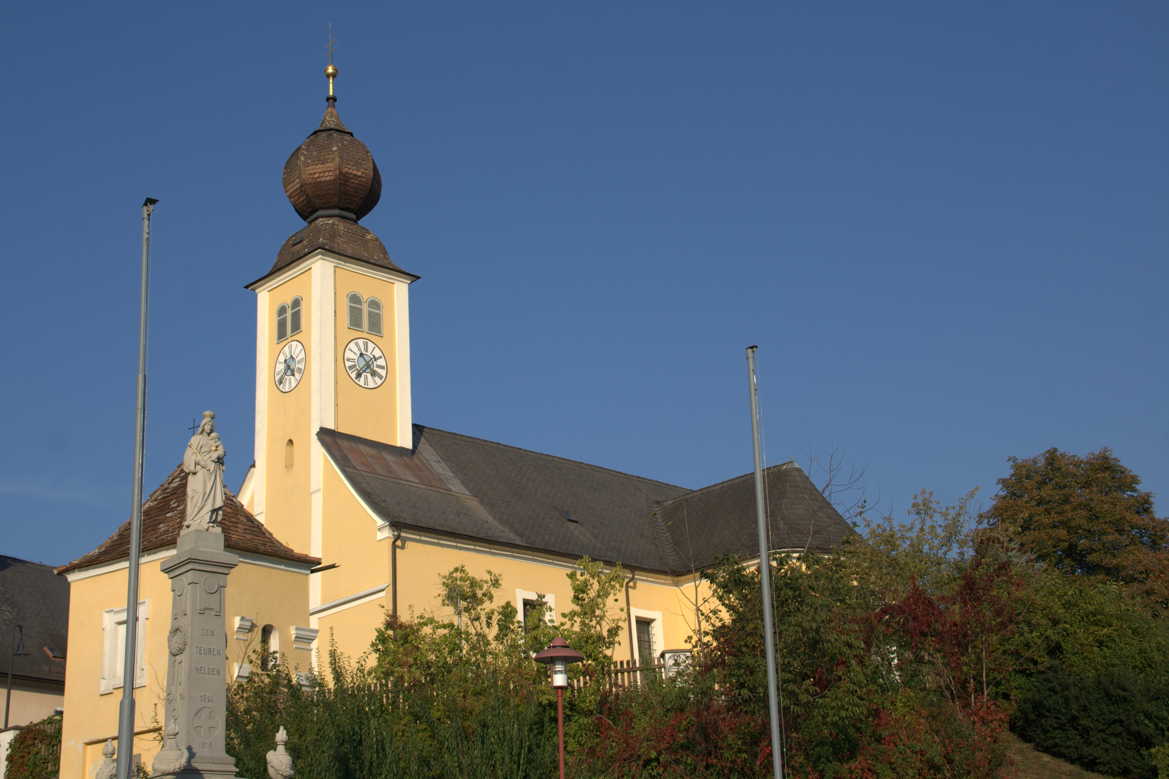 Kath. Pfarrkirche hl. Bartholomäus